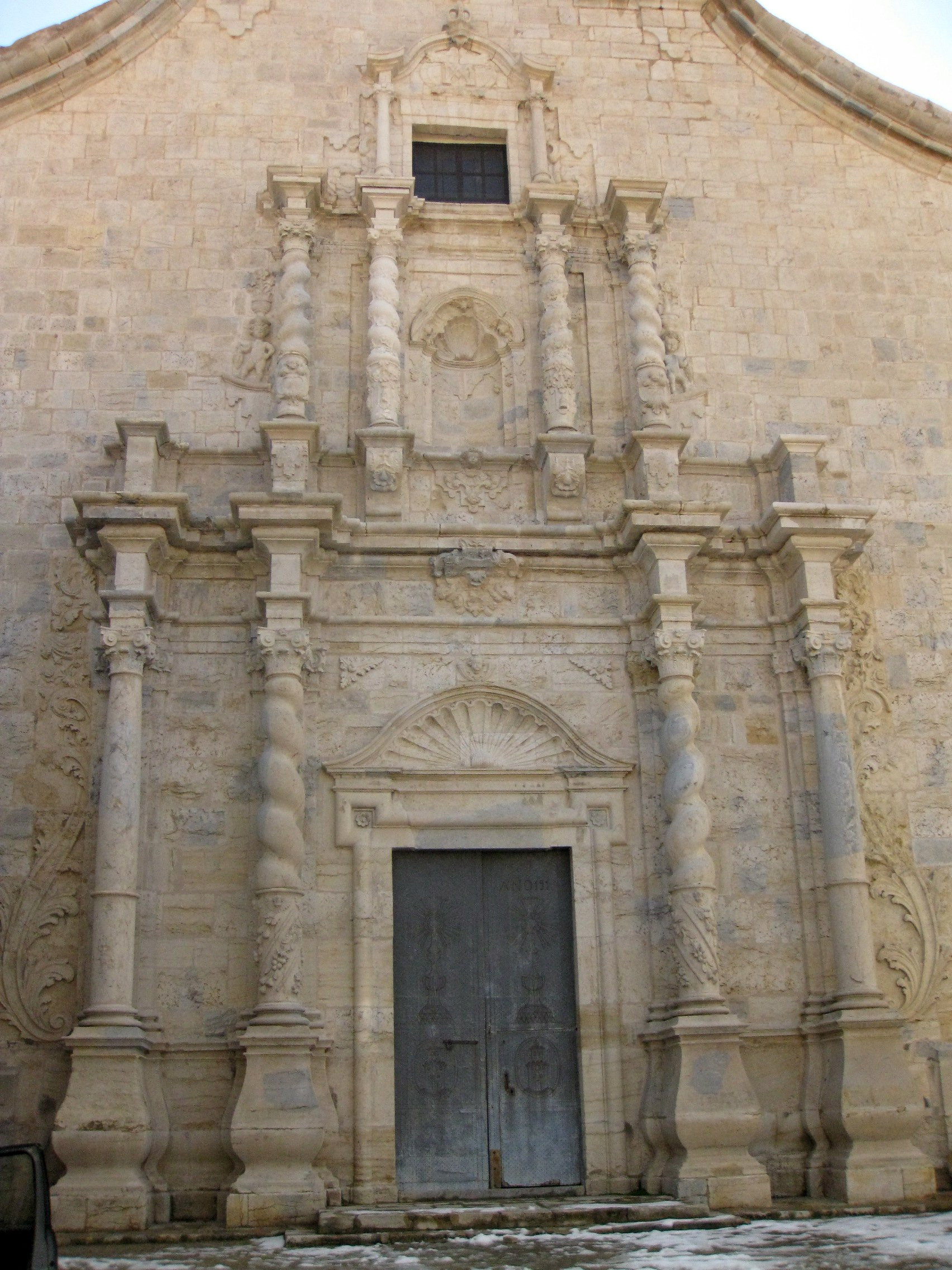 Església parroquial de l'Assumpció (Ares del Maestrat) 02.014-006.